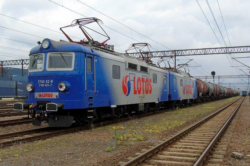 Elektrowóz ET40-52 eksploatowany przez Lotos Kolej stoi na stacji Warszawa Praga Tranzytowa.